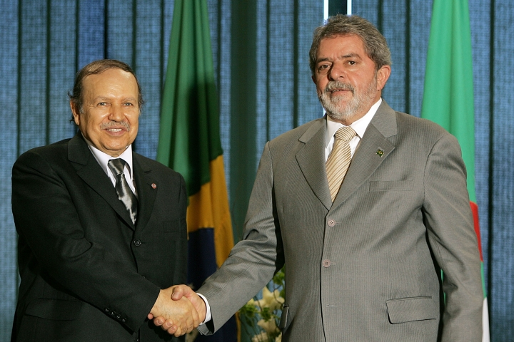 Brasília - Presidente Lula cumprimenta o presidente da República Argelina, Abdelaziz Bouteflika, no Palácio do Planalto . Foto: Ricardo Stuckert/PR